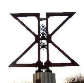 Monument Moerdijkbrug (waarin opgenomen sculpttur van Frits van Hall)